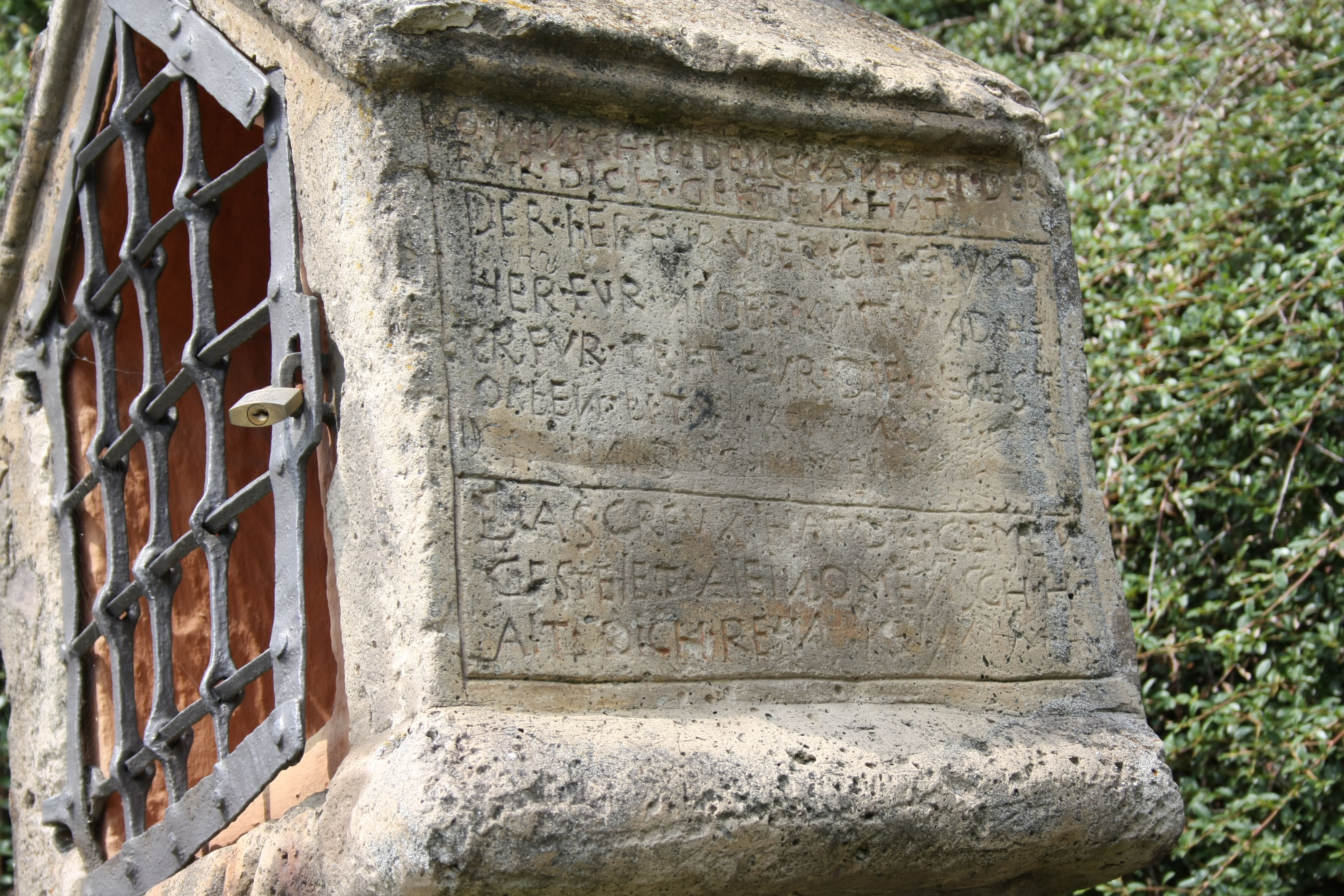 Bildstock in Niederdürenbach, bez. 1699, Brohltalstraße/Ecke Ernteweg, Detail mit Inschrift